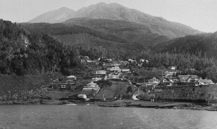 Foto. Hotels aan het meer van Sarangan